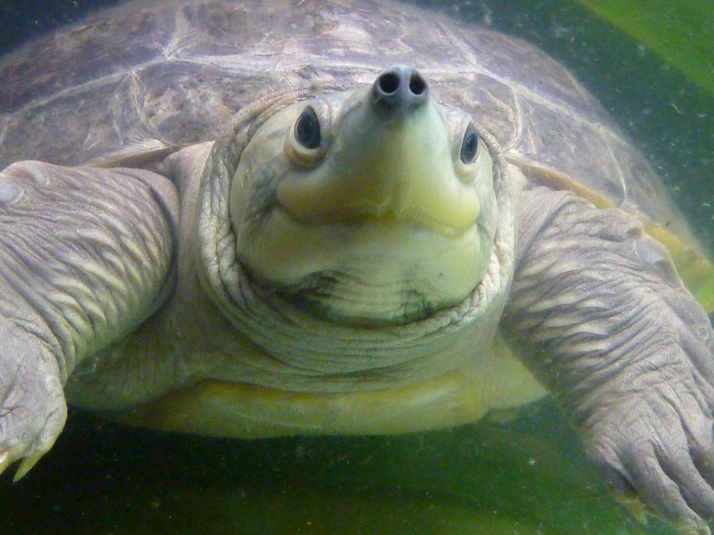 Erste Welteweite Nachzucht im Tierpark Schönbrunn Wien